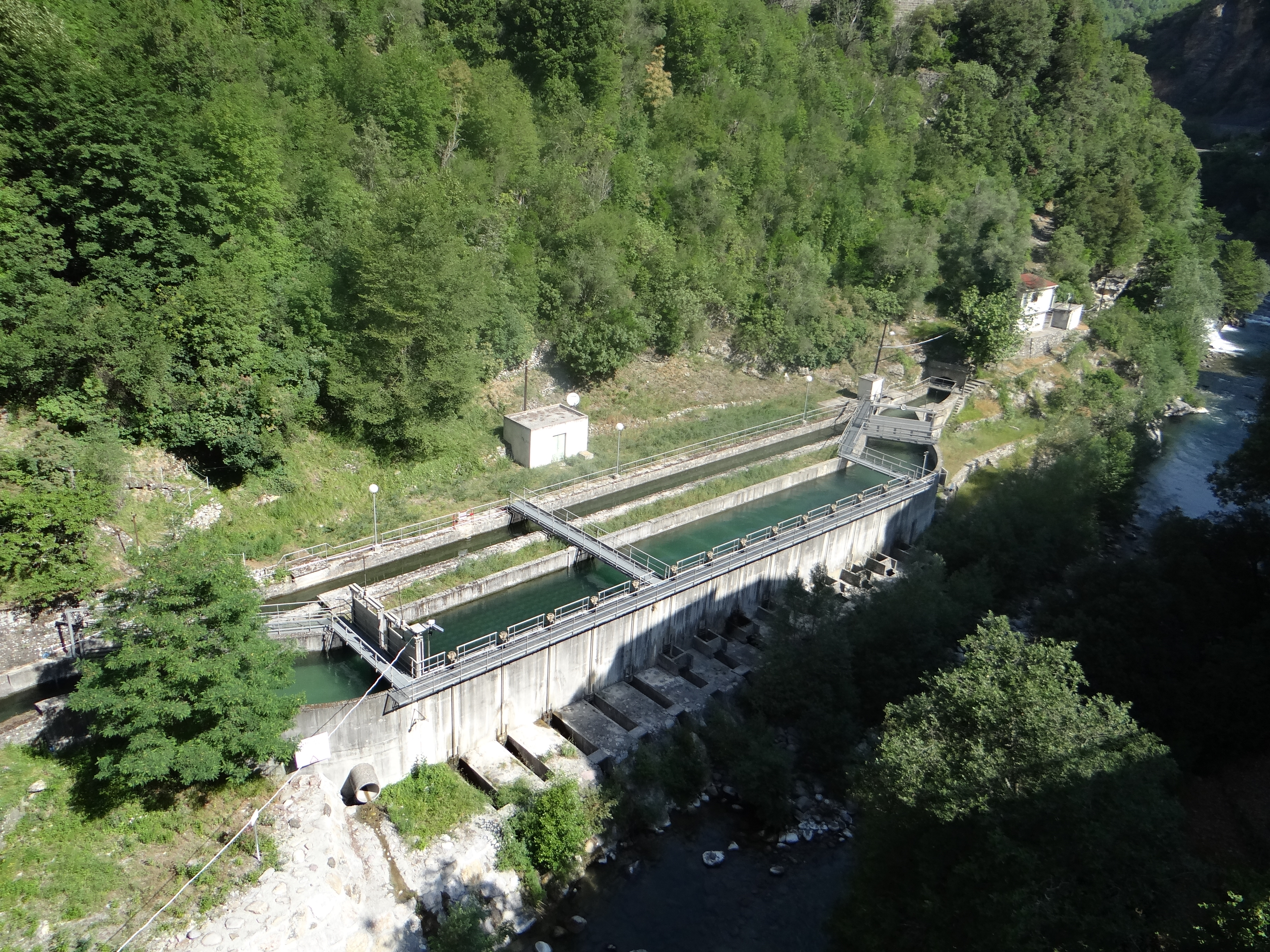 Utelle - Saint-Jean-la-Rivière (hameau) - Prise d'eau vue du pont